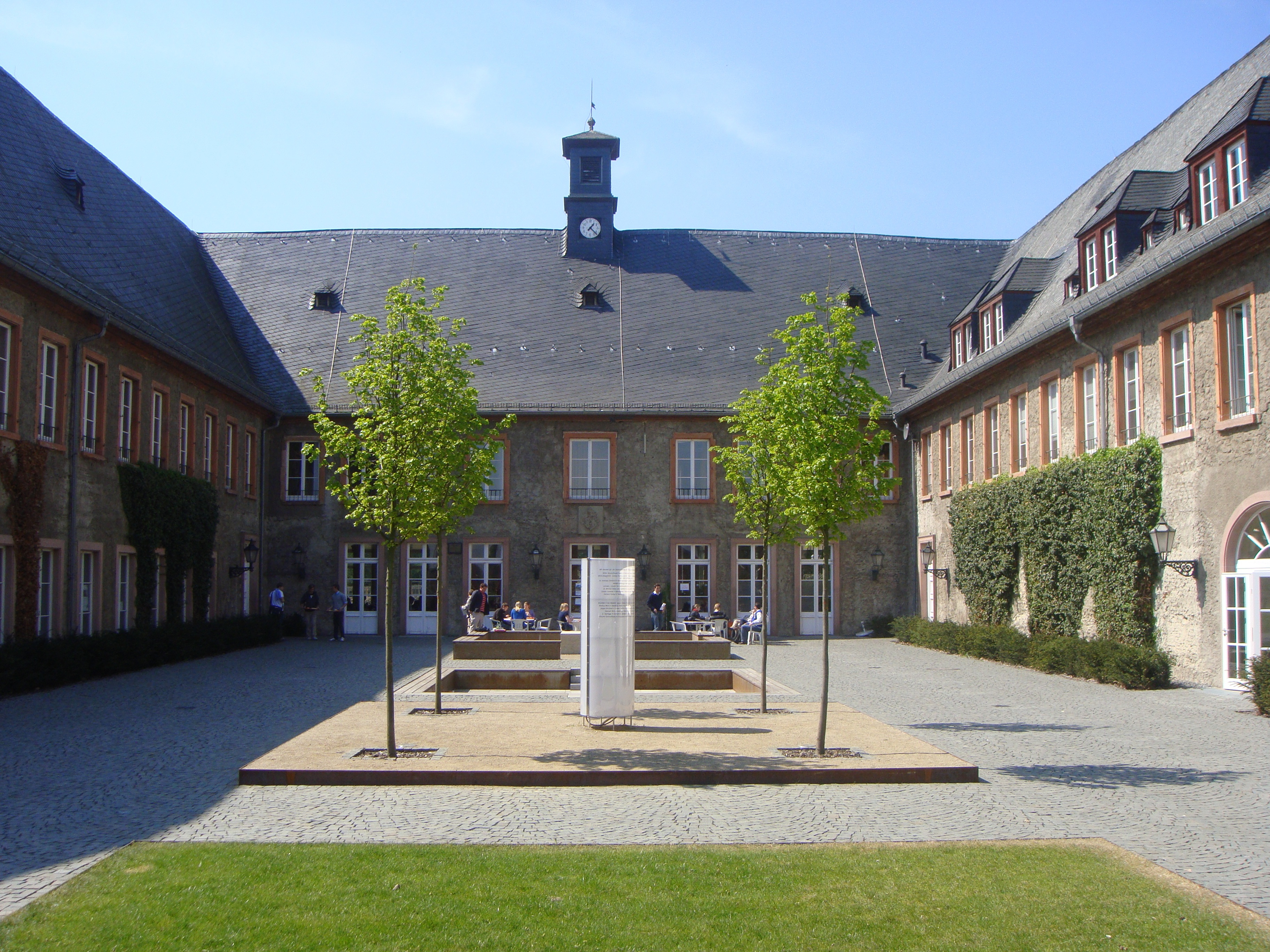 EBS Business School, Oestrich Winkel, Blick in den Innenhof des Hauptgebäudes